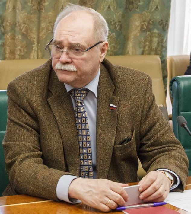 Владимир Владимирович Бортко (род.1946) — российский кинорежиссёр, сценарист и продюсер